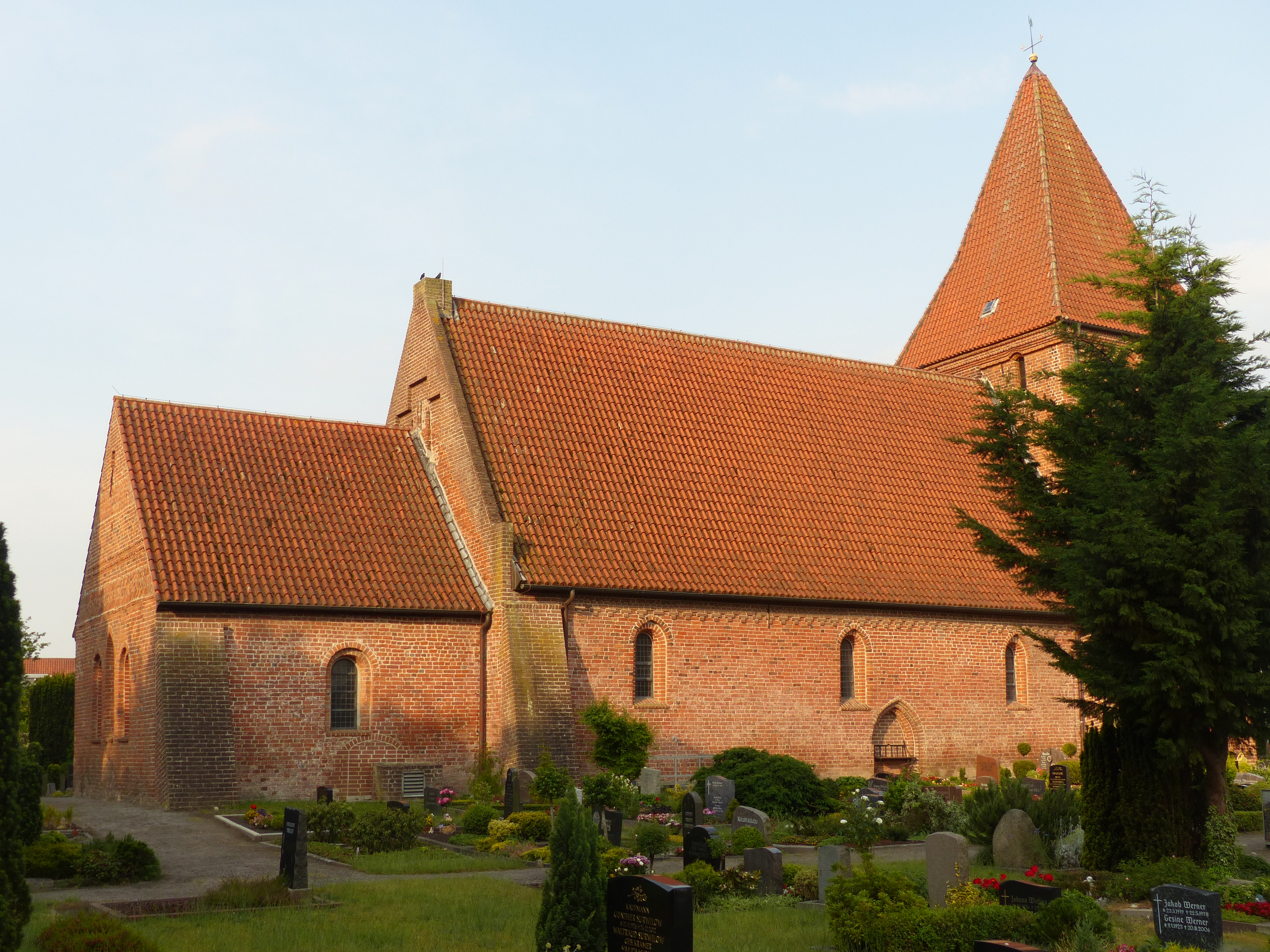 St.-Pankratius-Kirche in Stuhr